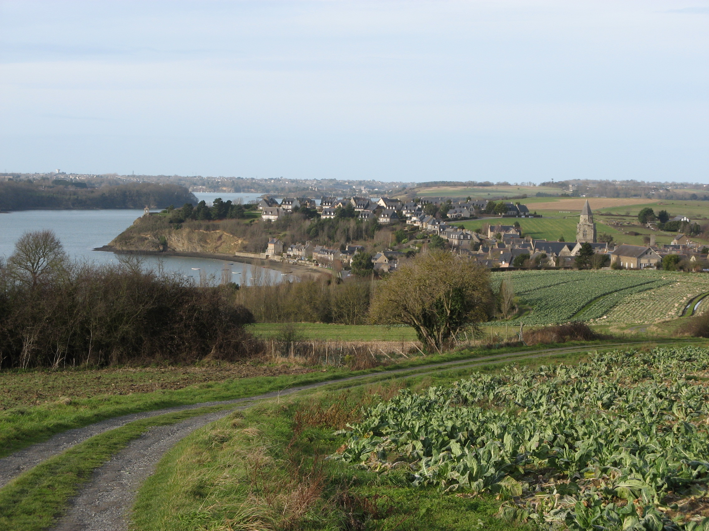 Saint-Suliac : Village vue de garrot.